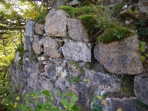 Burgruine Sarmingstein